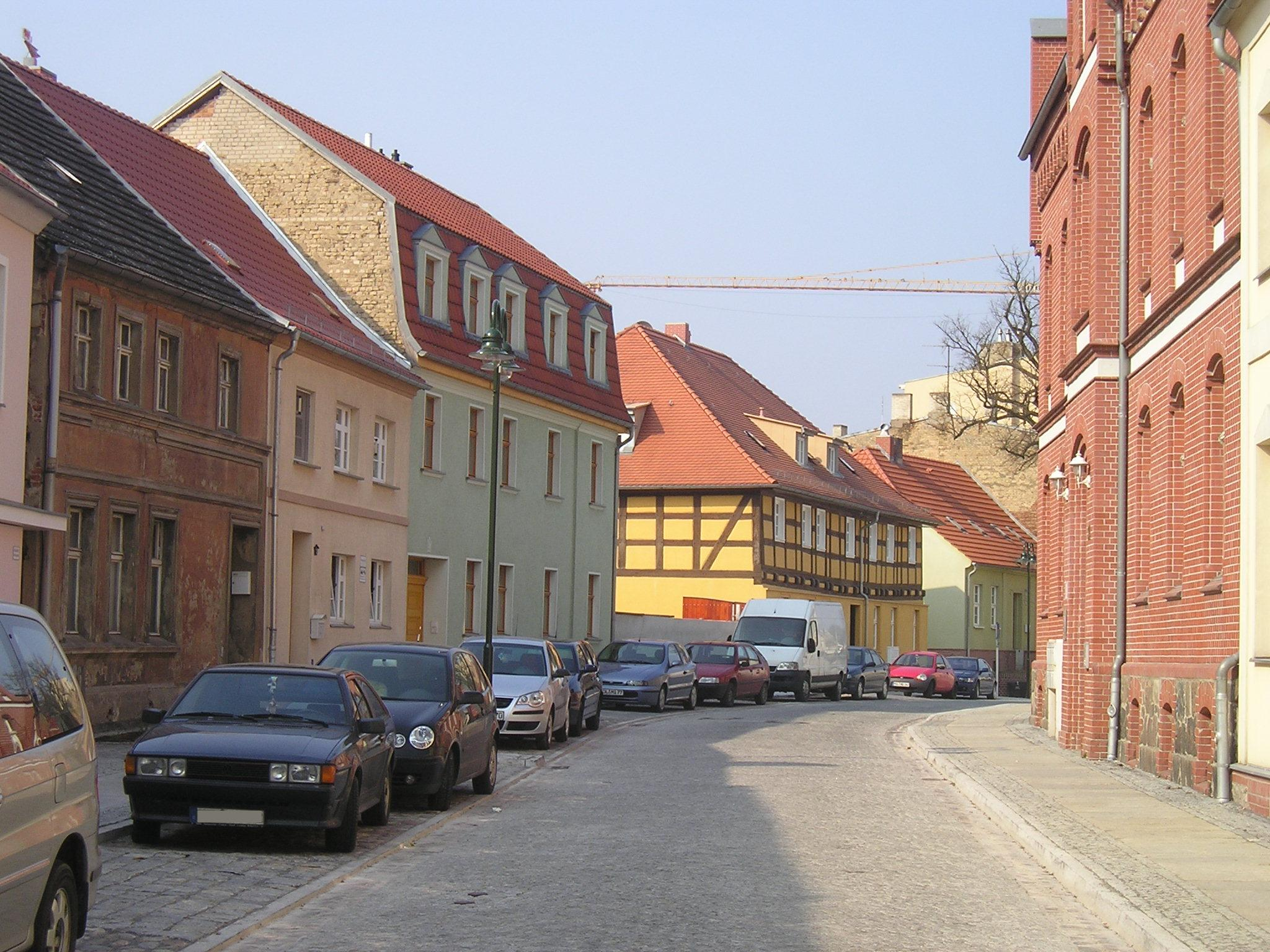 Georg-Kurtze-Straße in Strausberg